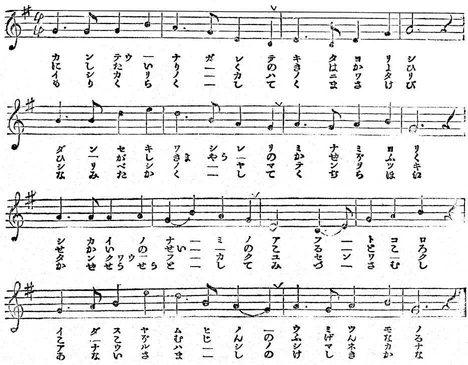 北海タイムス社懸賞募集『北海道歌』（1904年版）の楽譜。 作詞:藤沢古雪（藤沢周次、1875-1945） 作曲:小山作之助（1864-1927）